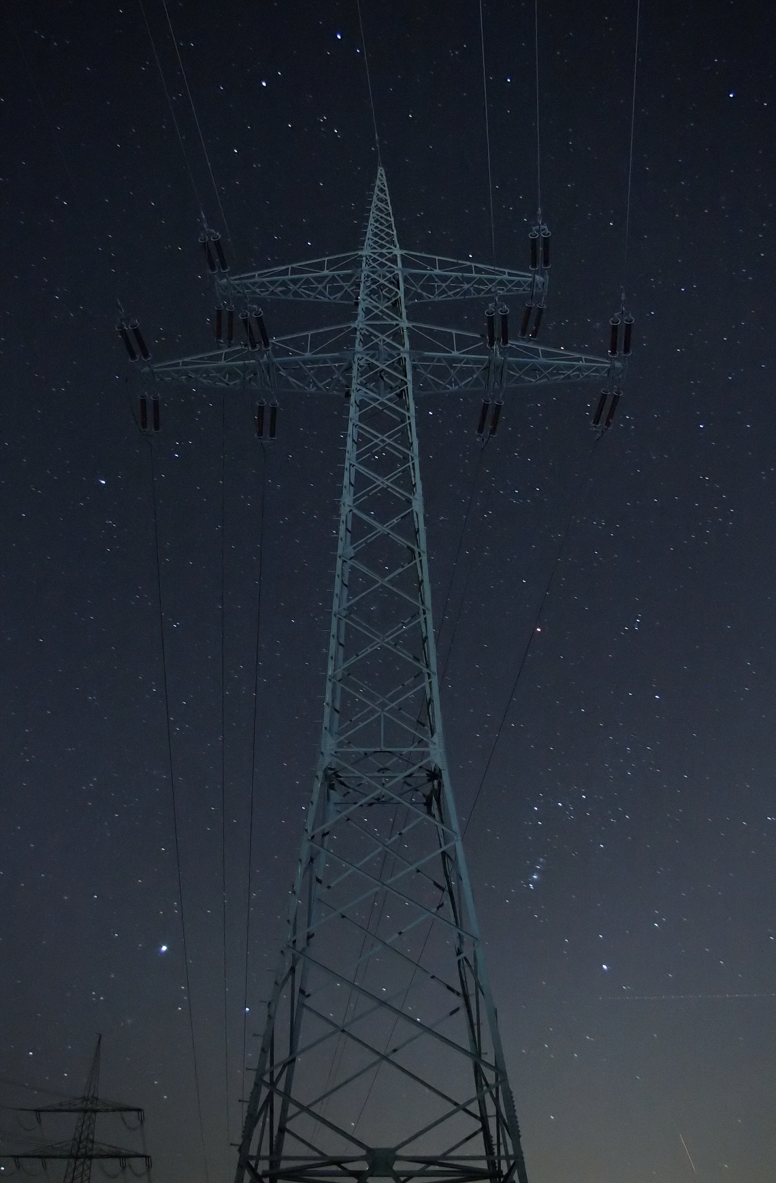 Hochspannungsfreileitung (Bl. 1560 M15, 110 kV) in Unna vor Sternenhimmel. Langzeitbelichtung und entfesselter Blitz. Das Blitzgerät wurde einige Meter seitlich der Kamera aufgestellt und während der Belichtung zweimal manuell ausgelöst.